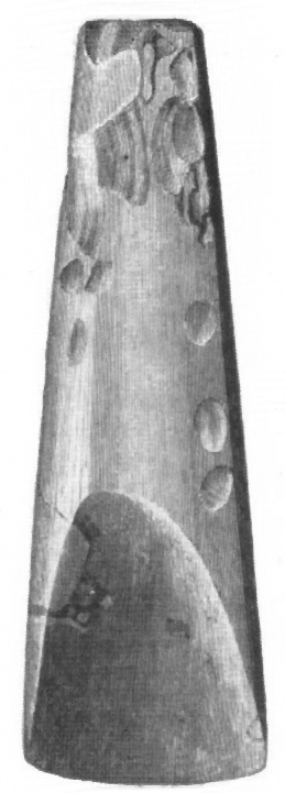 Håleggad yxa av flinta, funnen i Bohuslän